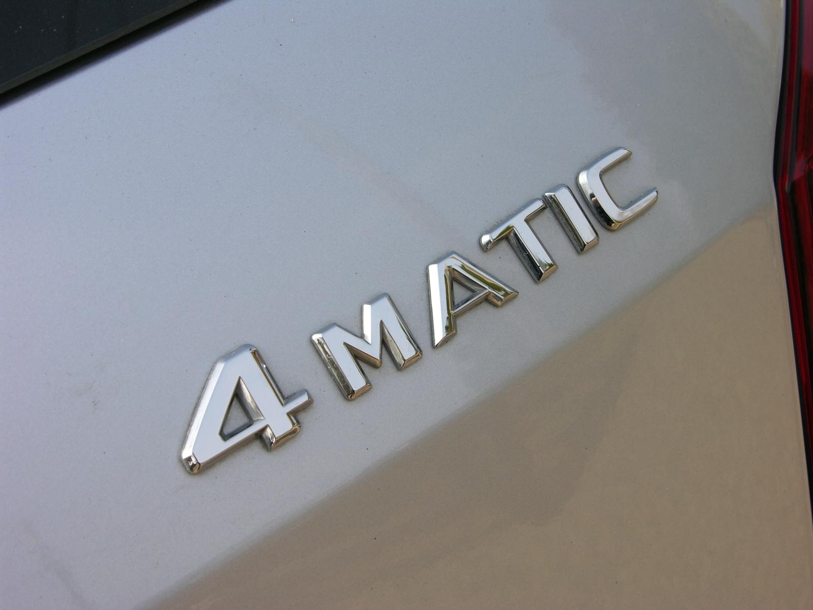 2008 Mercedes Benz GL420 CDi 4-Matic